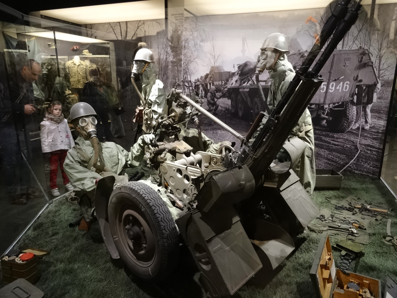 Muzeum Wojsk Lądowych w Bydgoszczy, ul. Czerkaska 2 podczas Nocy Muzeów 2015